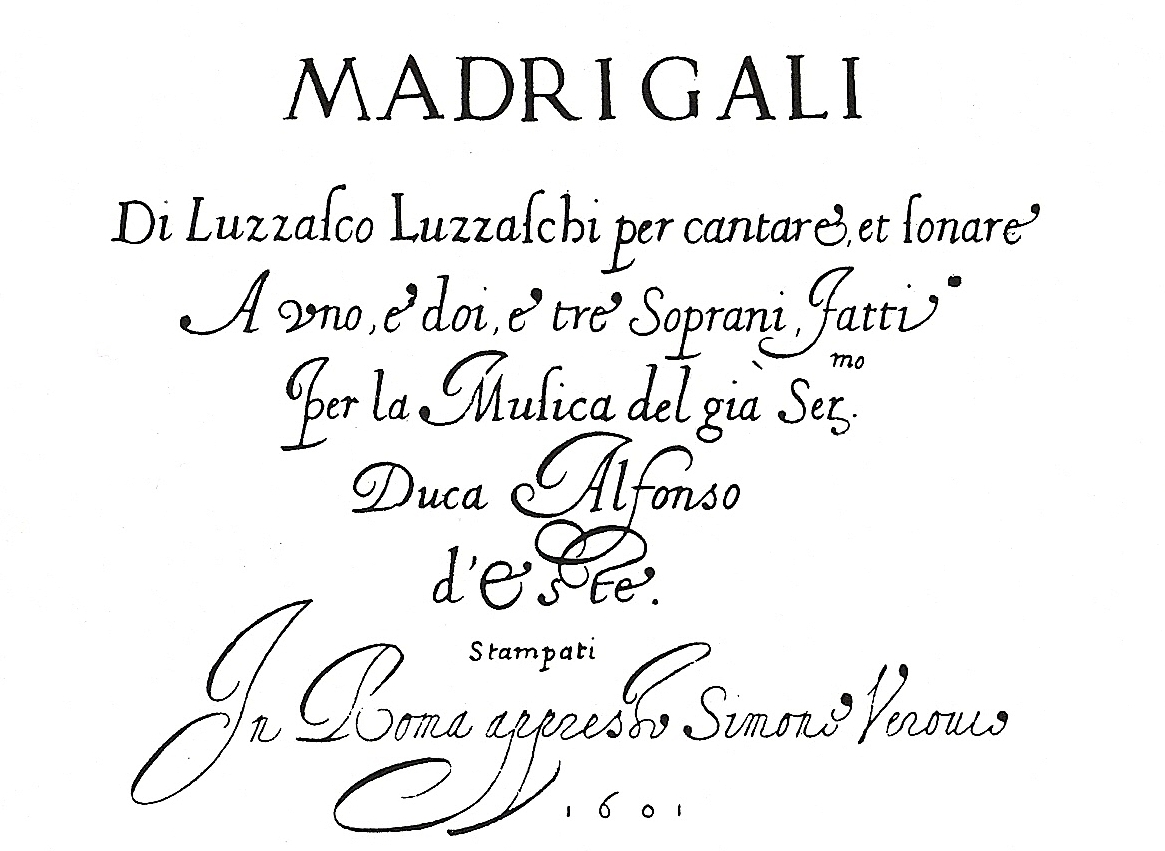 Title page of Luzzascho Luzzaschi's